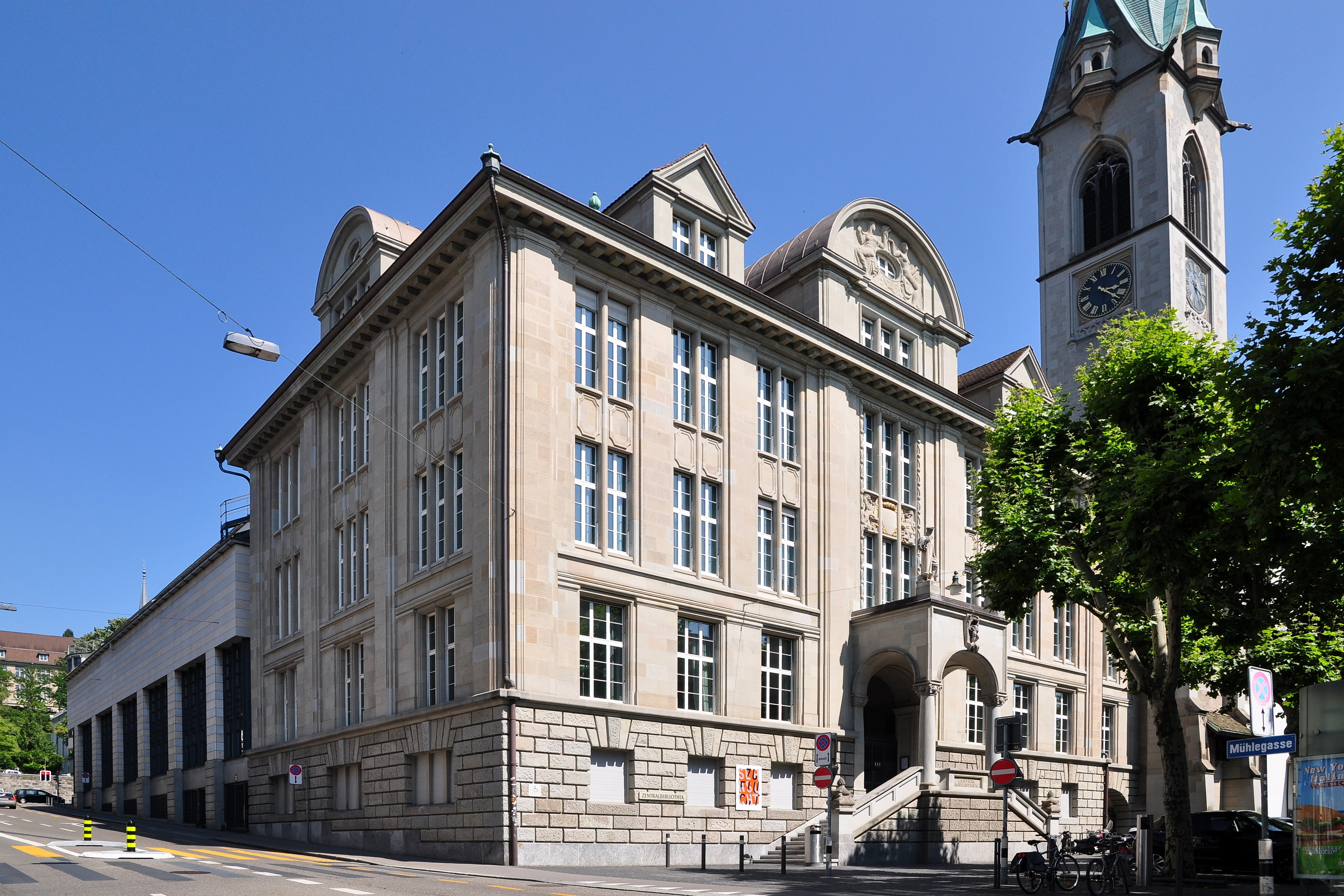 Zentralbibliothek in Zürich (Switzerland)